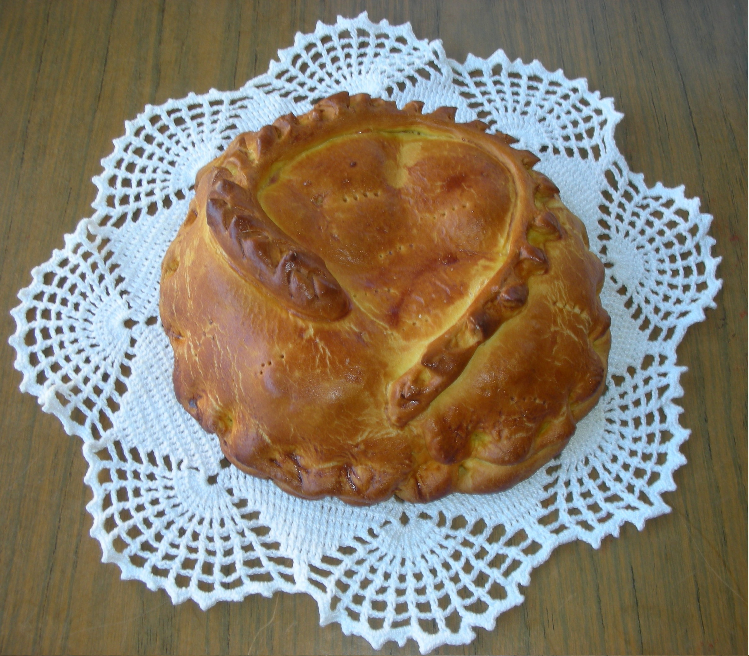 Empanada typique de la commune de Sotoserrano en Espagne